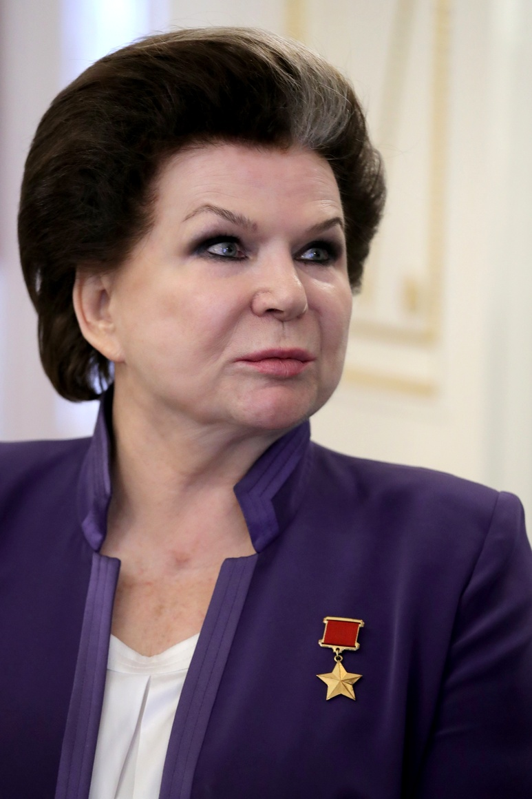 Лётчик-космонавт, Герой Советского Союза Валентина Терешкова во время встречи с Президентом России Владимиром Путиным